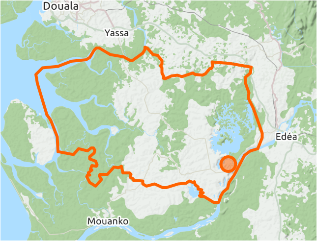 Limites communales de Dizangue au Cameroun, OSM. This map may be incomplete, and may contain errors. Don't rely solely on it for navigation.